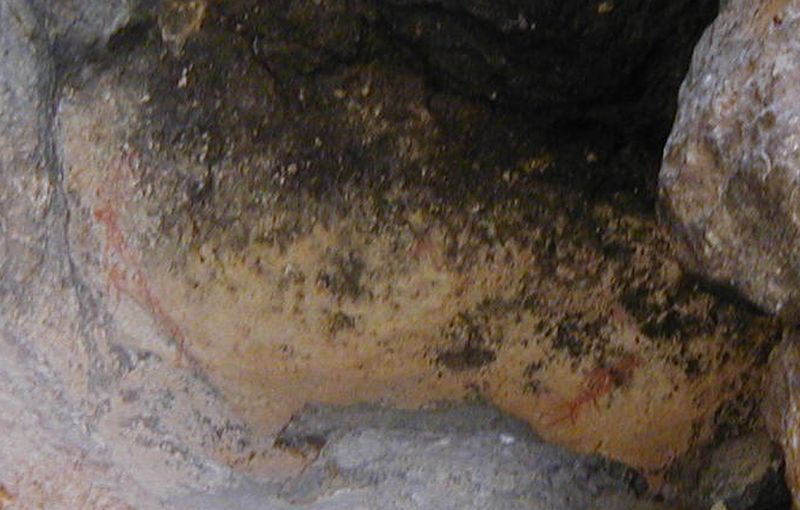 Pinturas rupestres del Ojo del arquillo. Robledo. Albacete